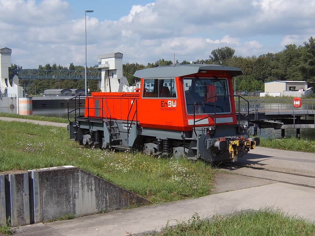 allrad DH 440, "DB 350 001", EnBW, Karlsruhe/Hafen, 25.01.2000